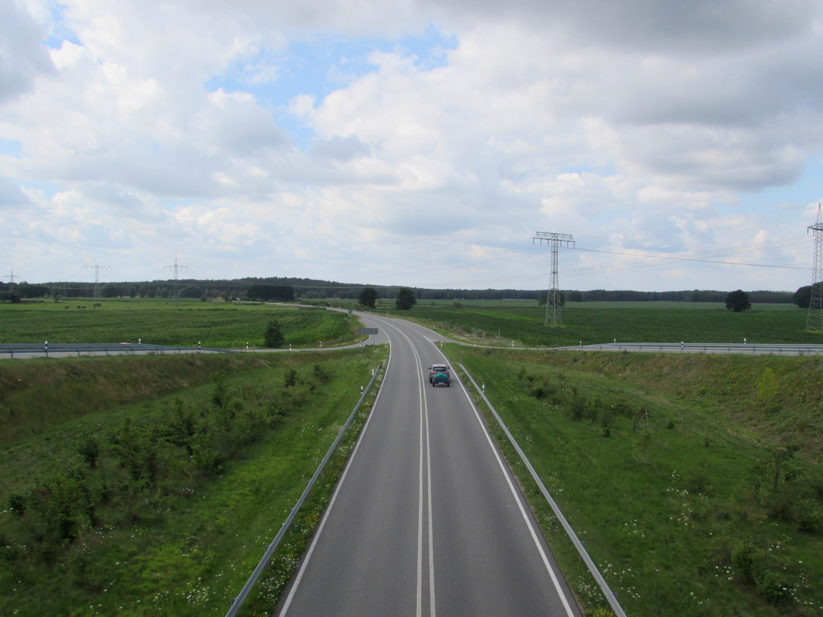 Kraftfahrstraße L96 zwischen Bensdorf und Vehlen